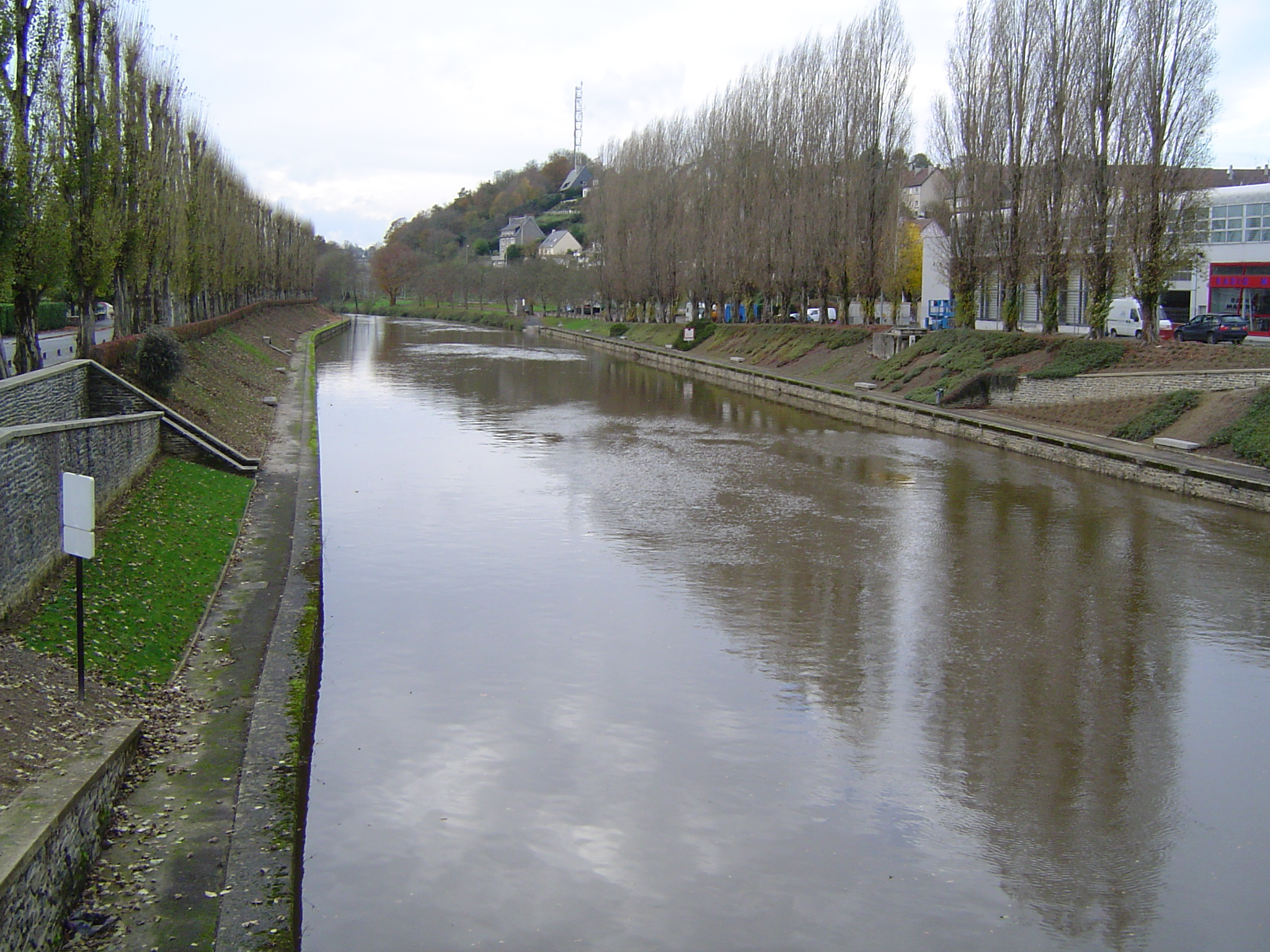 the Vire River at Saint-lô (le déversoir)